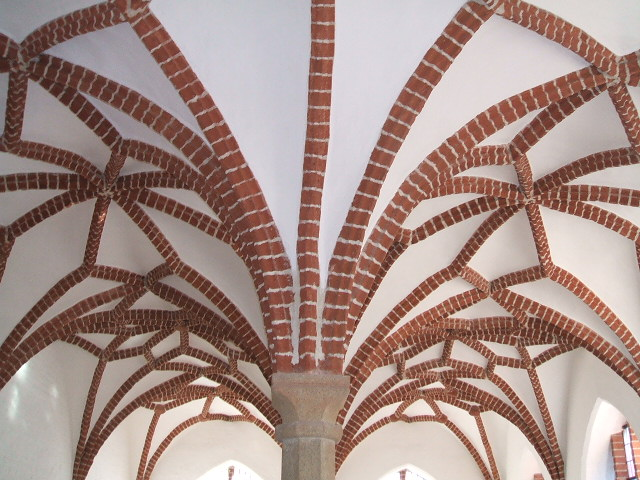 Das Foto zeigt Details des Katharinenklosters in Stralsund im März 2007.